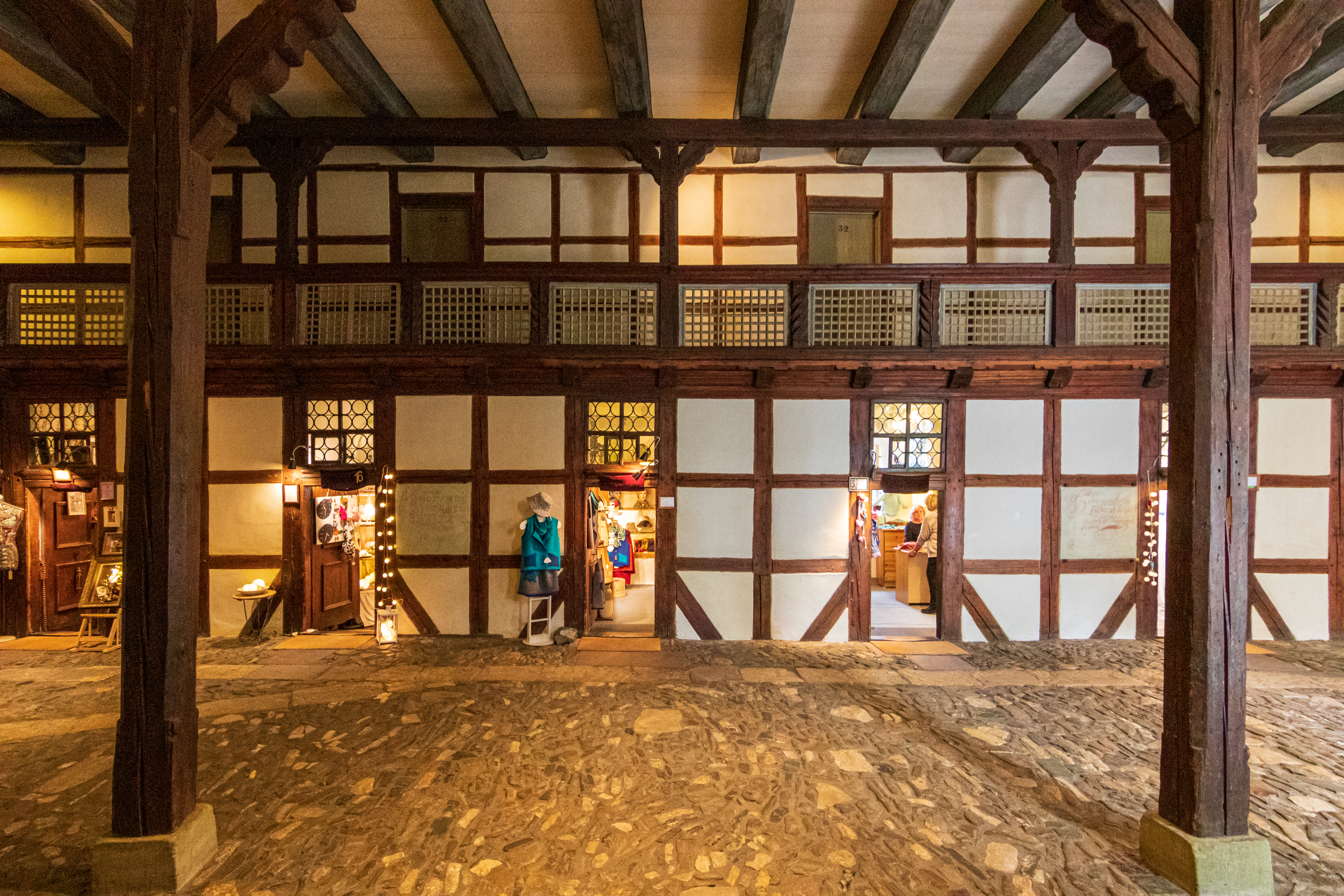 Hospital Great Holy Cross